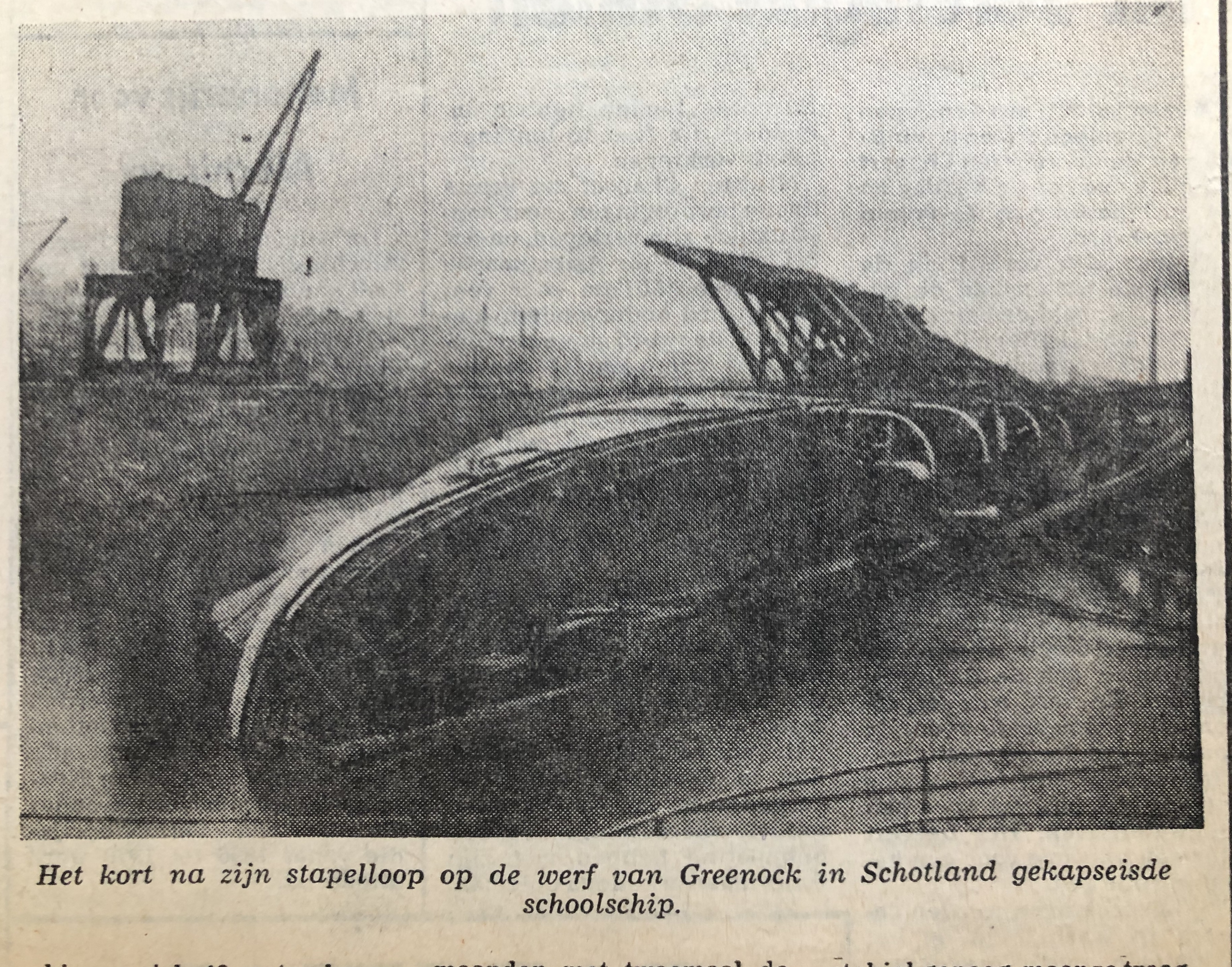 Het gekapseisde schoolschip op de Schotse werf vlak na de tewaterlating.